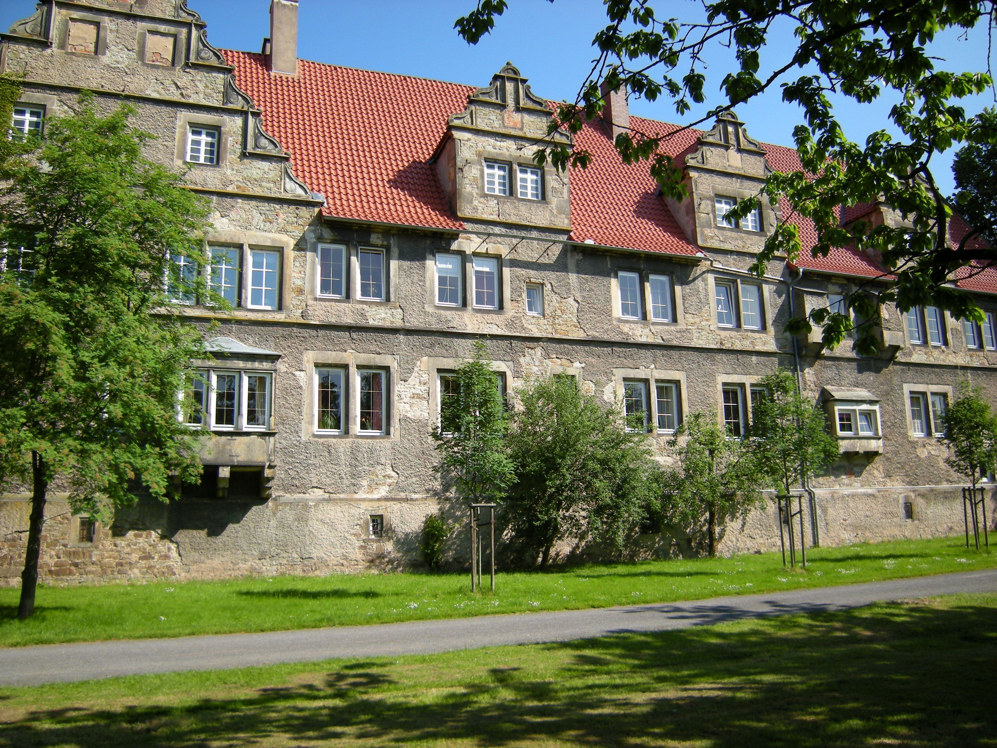 Hessisch Oldendorf-Münchhausenhof der Weserrenaissance 1583.jpg